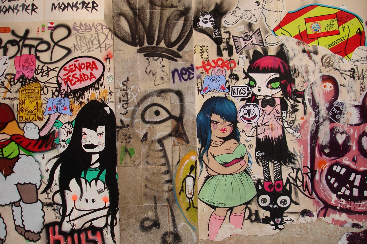 Graffiti by Miss Van and Ciou, Plaça de Sant Josep/Mercat de la Boqueria, Ciutat Vella (Barcelona)Miss Van y Ciou